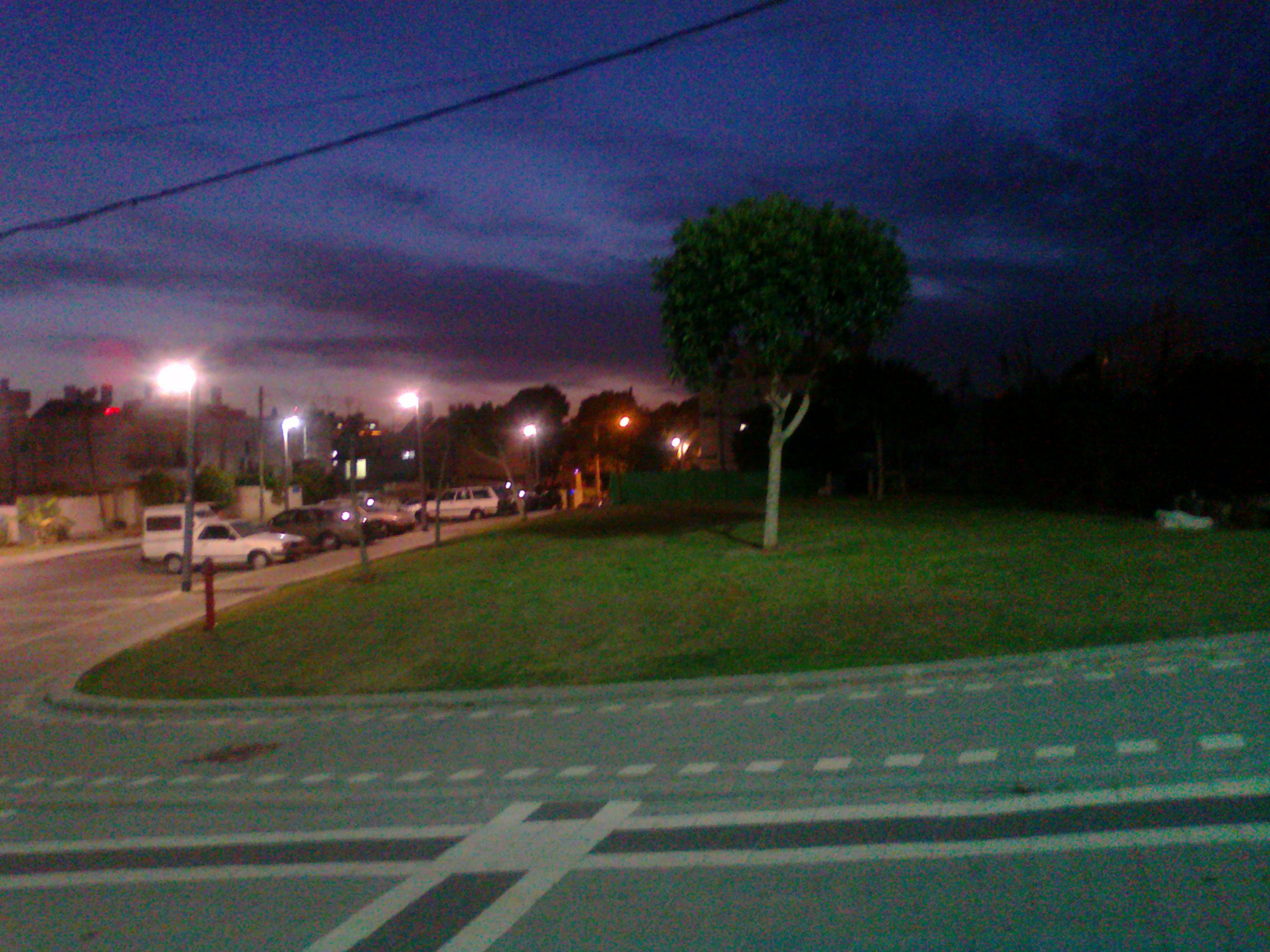 הפארק בערב